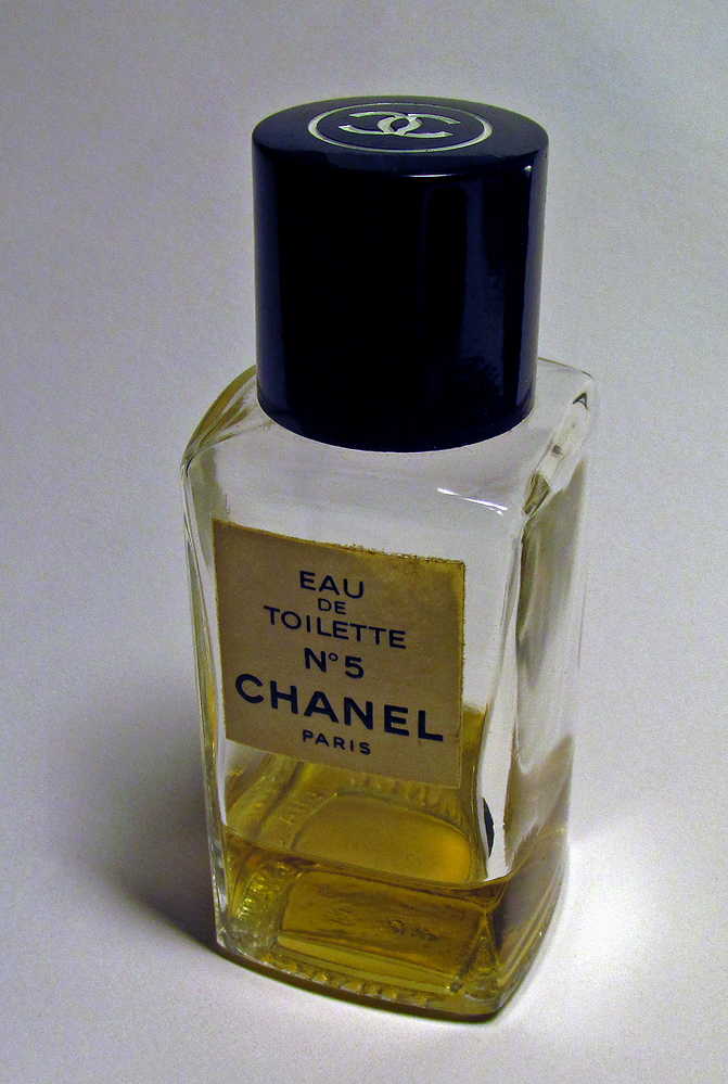 Klassisk parfym från Chanel, denna flaskmodell från 1970.